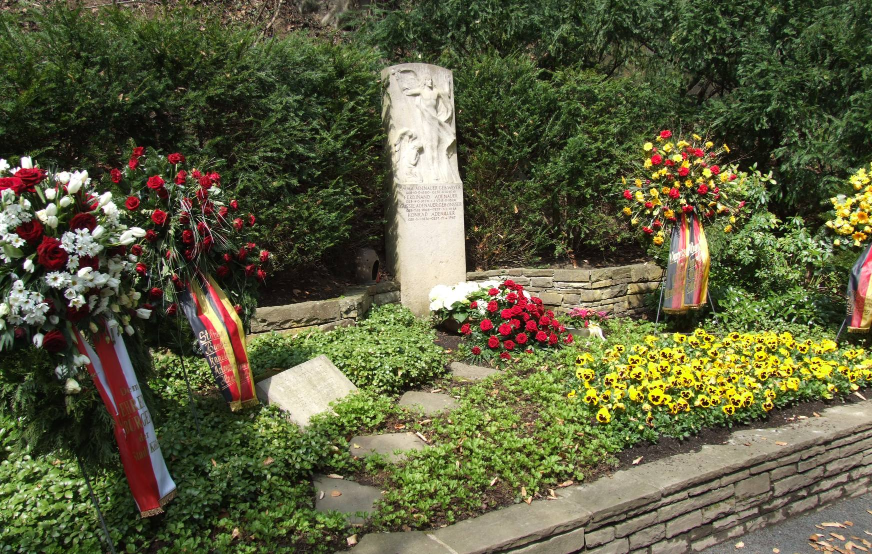 Grab von Konrad Adenauer und Emma Weyer auf dem Waldfriedhof in Rhöndorf